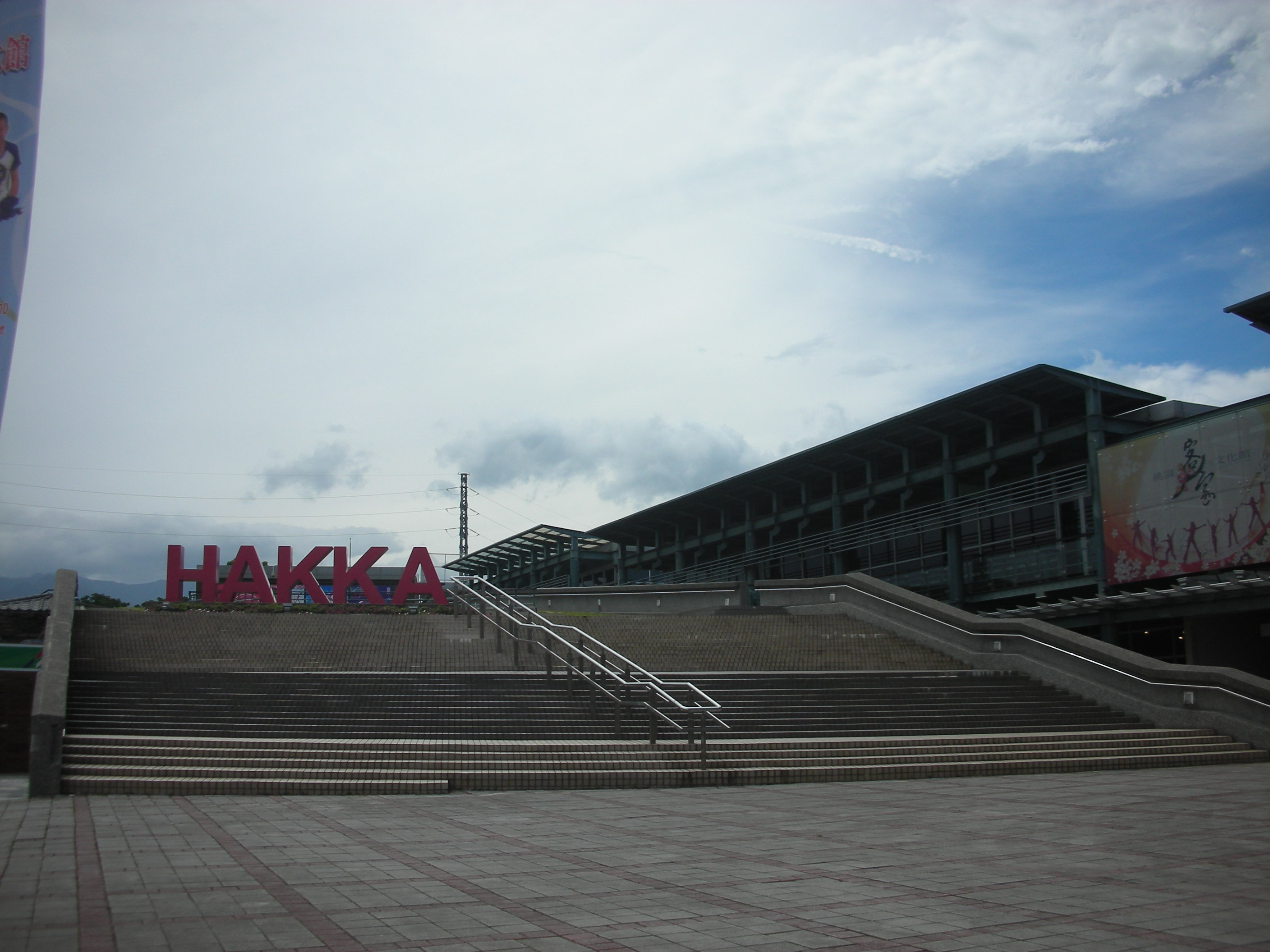 桃園縣客家文化館，位於桃園縣龍潭鄉